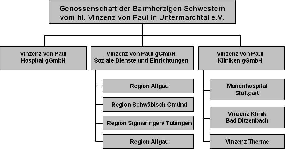 Organisatonsstruktur der Genossenschaft der Barmherzigen Schwestern vom hl. Vinzenz von Paul in Untermarchtal e.V. des Ordens der Barmherzigen Schwestern vom hl. Vinzenz von Paul